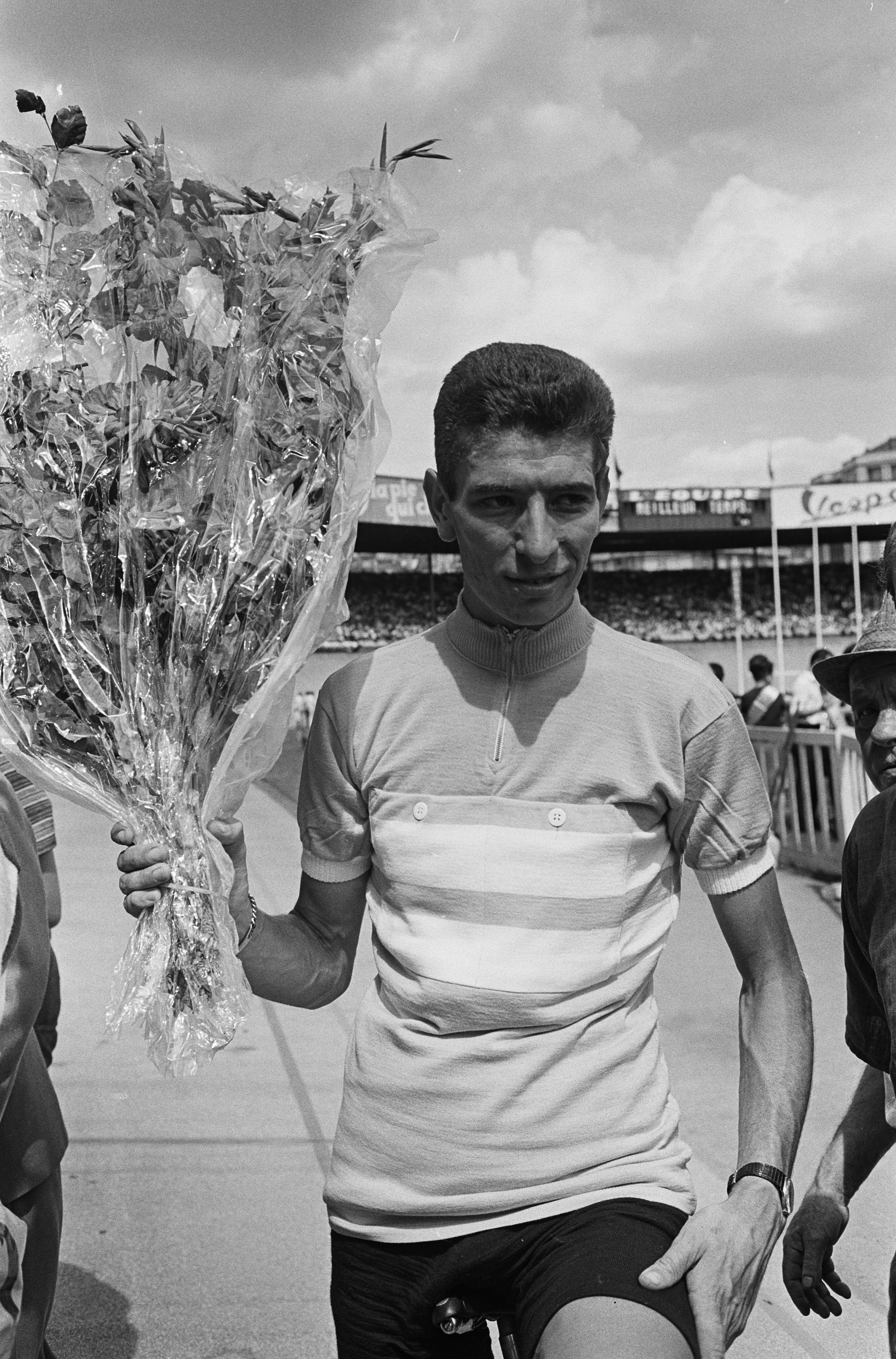 Tour de France aankomst Parijs winnaar Tour de lAvenir.